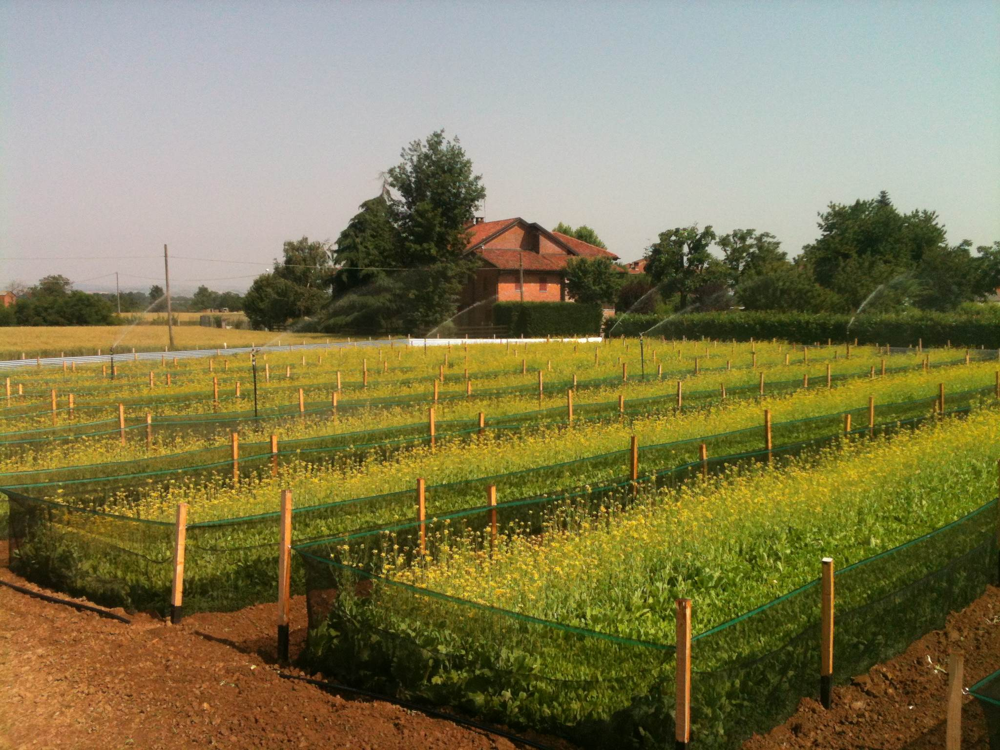 Allevamento all'aperto, a ciclo biologico completo. Farming snails.